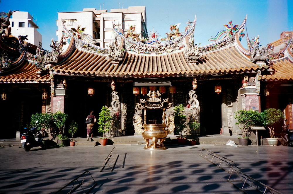 蘆洲保和宮前殿。